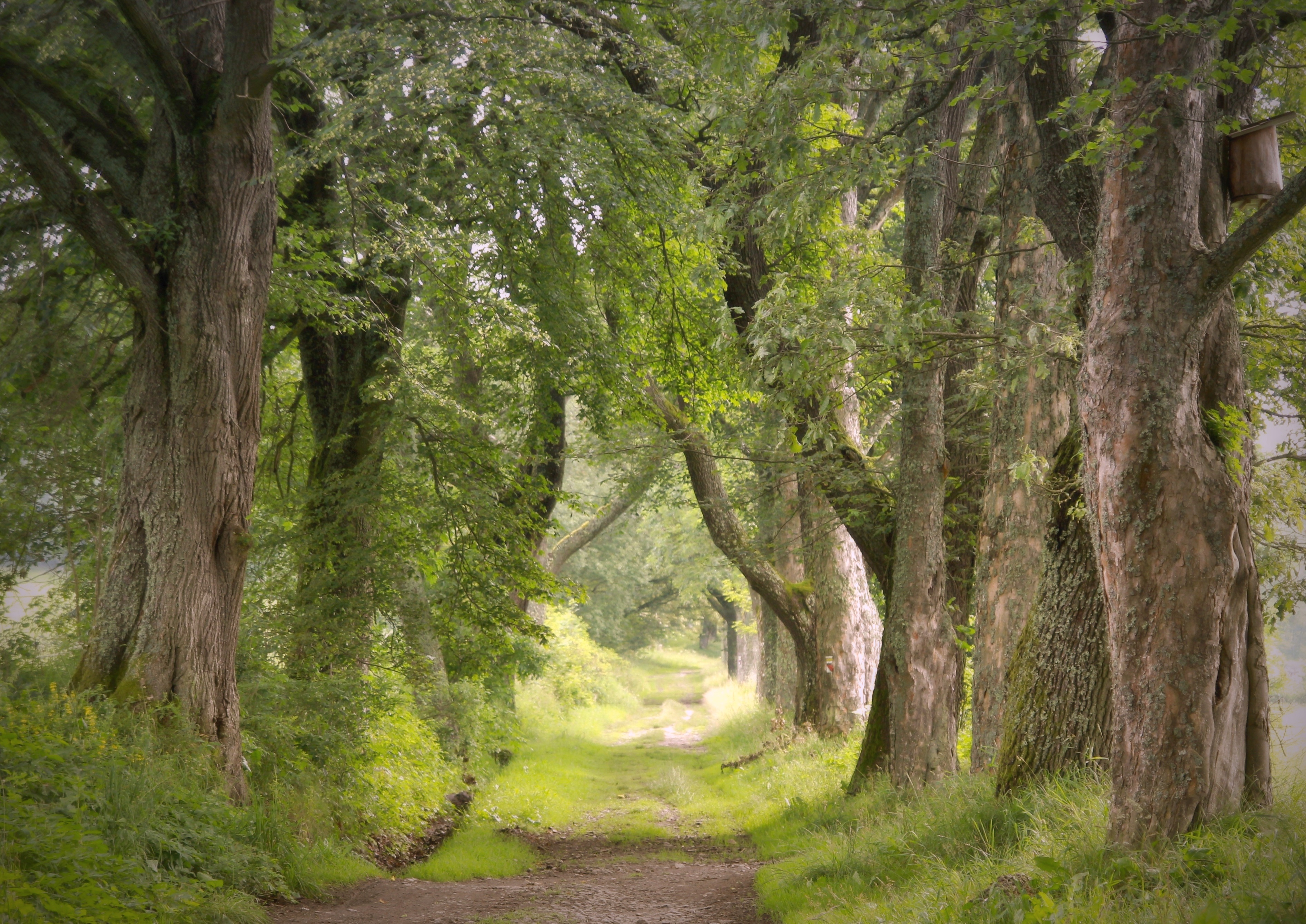 Zlatá stezka